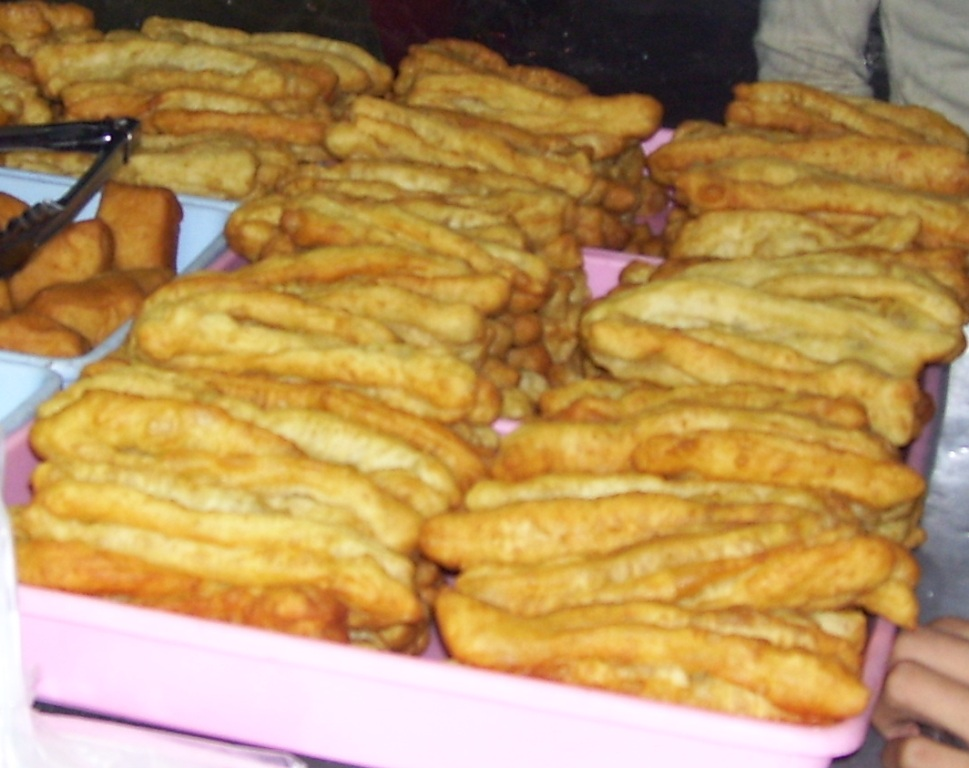 Cakwe Indonesian Snack